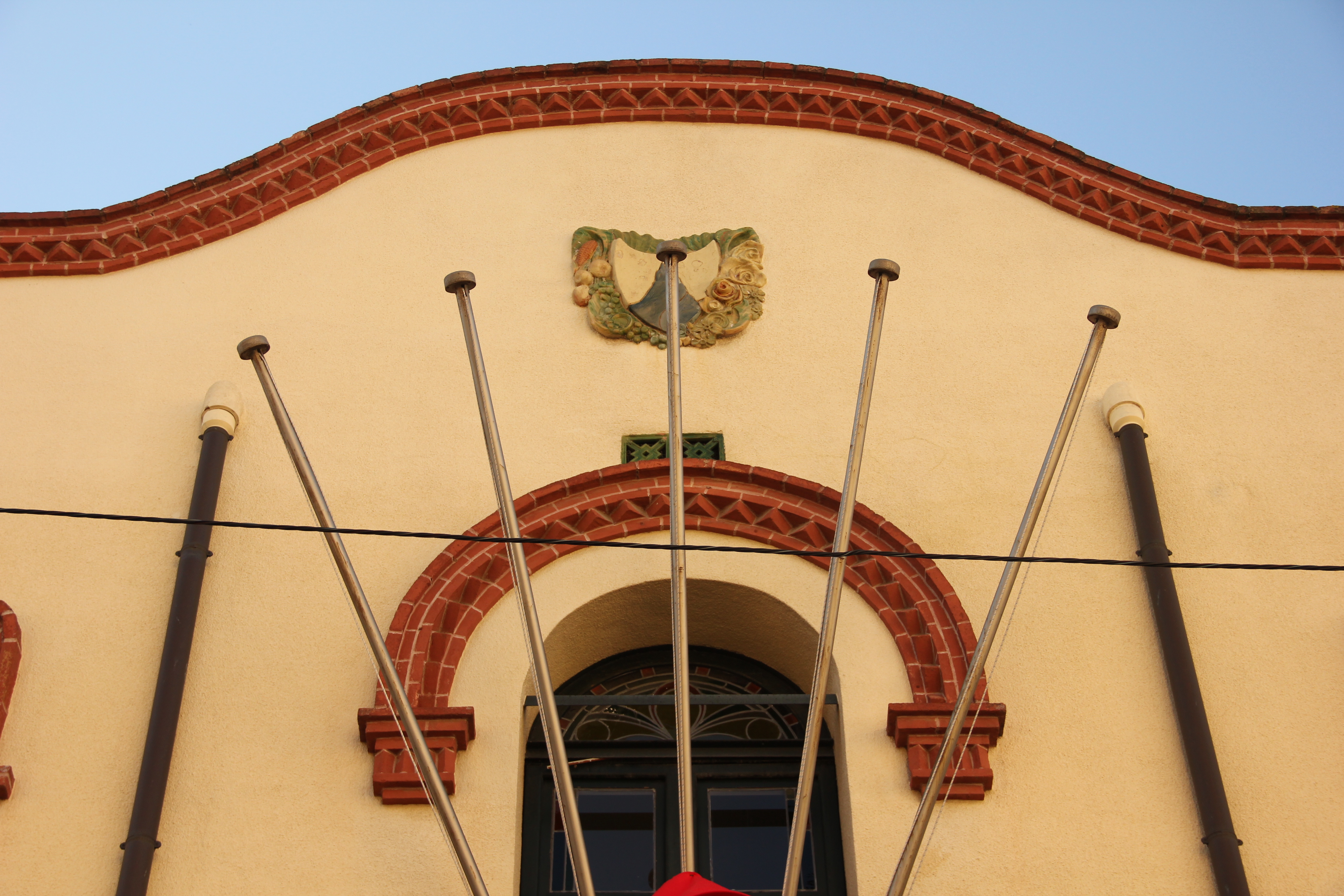 Antic Ajuntament de Montcada i Reixach construït per Josep Graner i Prat